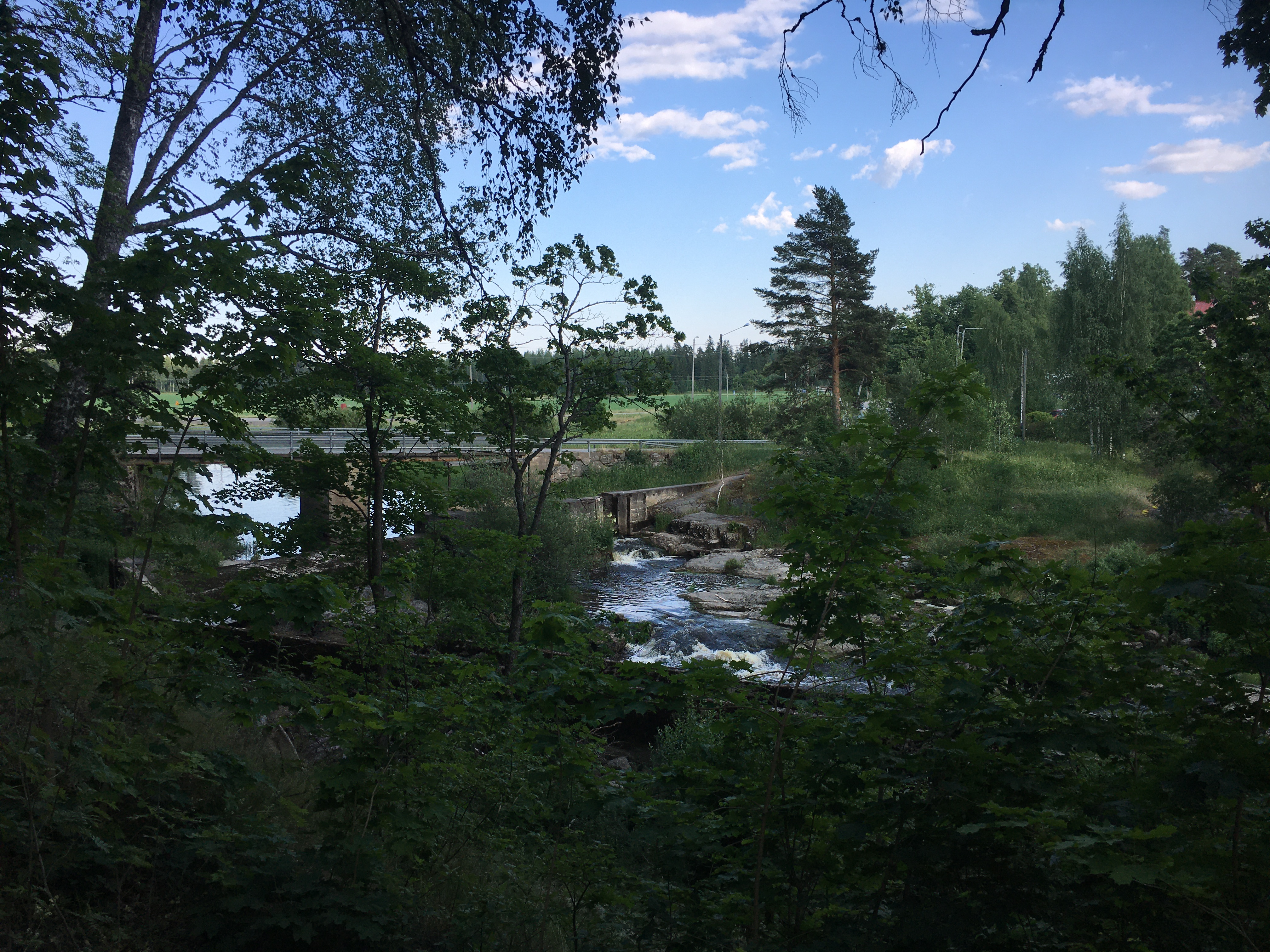 Mustijoki Nummistenkoski myllyn tms rakenteita